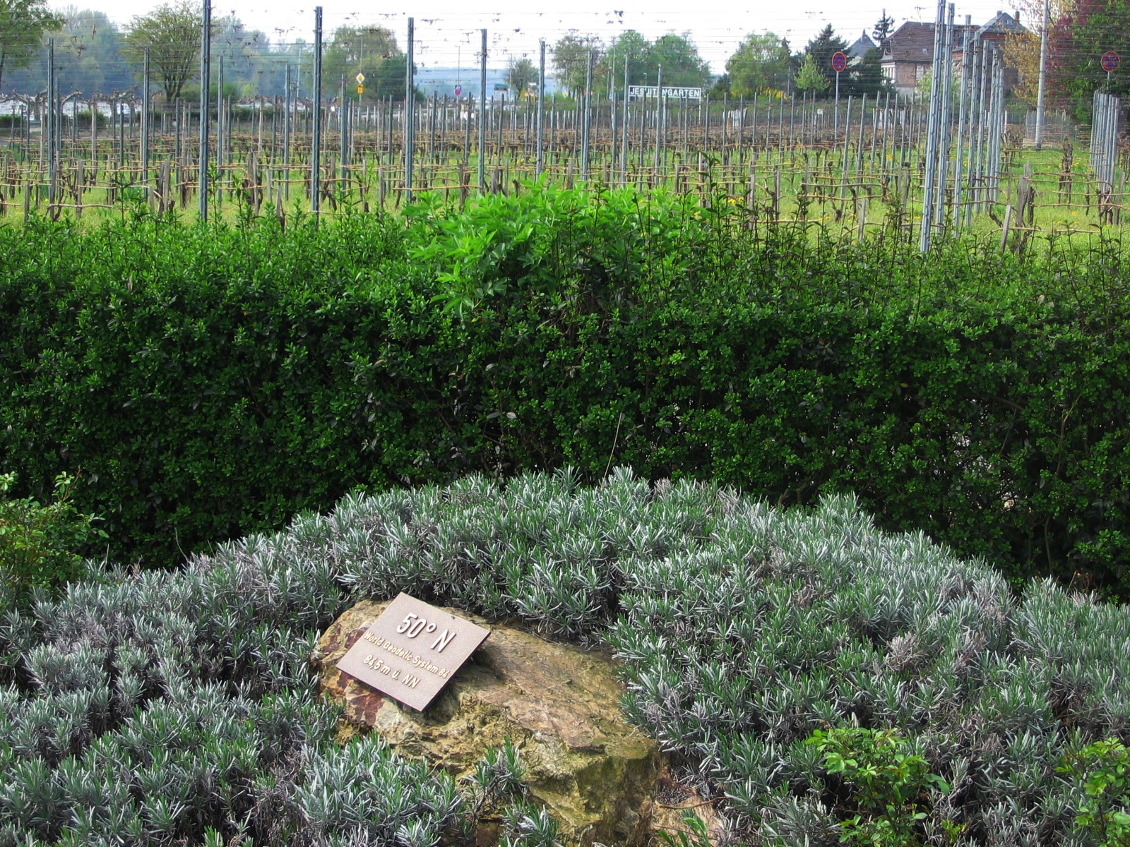 Lage des 50. Breitengrades nach World Geodetic System 1984 (WGS84) in Oestrich-Winkel im Rheingau am Parkplatz der Tourist Information, zwischen der Sankt-Aegidius-Basilika in Mittelheim und der Weinbergslage Jesuitengarten in Winkel (siehe Schriftzug im Bild). Nach dem für Topografische Karten in Deutschland angenommenen Potsdam-Datum liegt der 50. Breitengrad hier etwa 130 Meter weiter südlich.